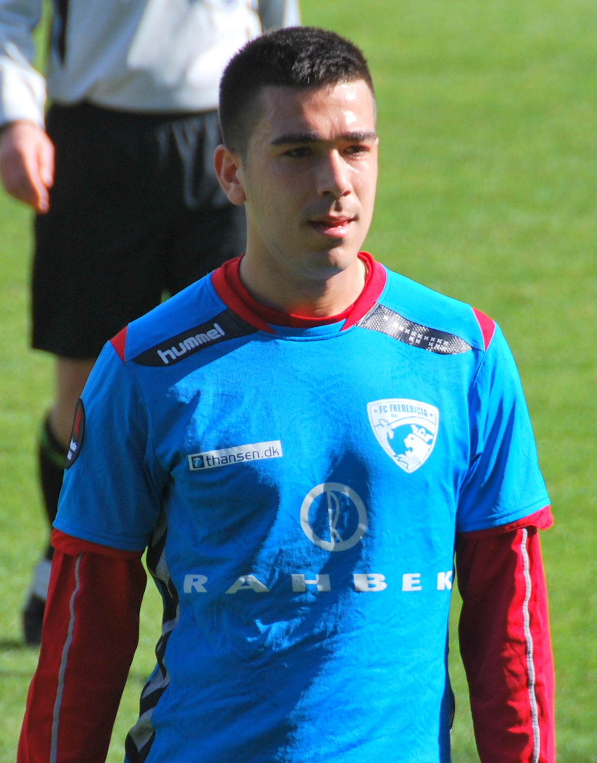 Fodboldspilleren Sanel Kapidzic fra FC Fredericia. Her i en testkamp mod Viborg FF på Viborg Stadion.